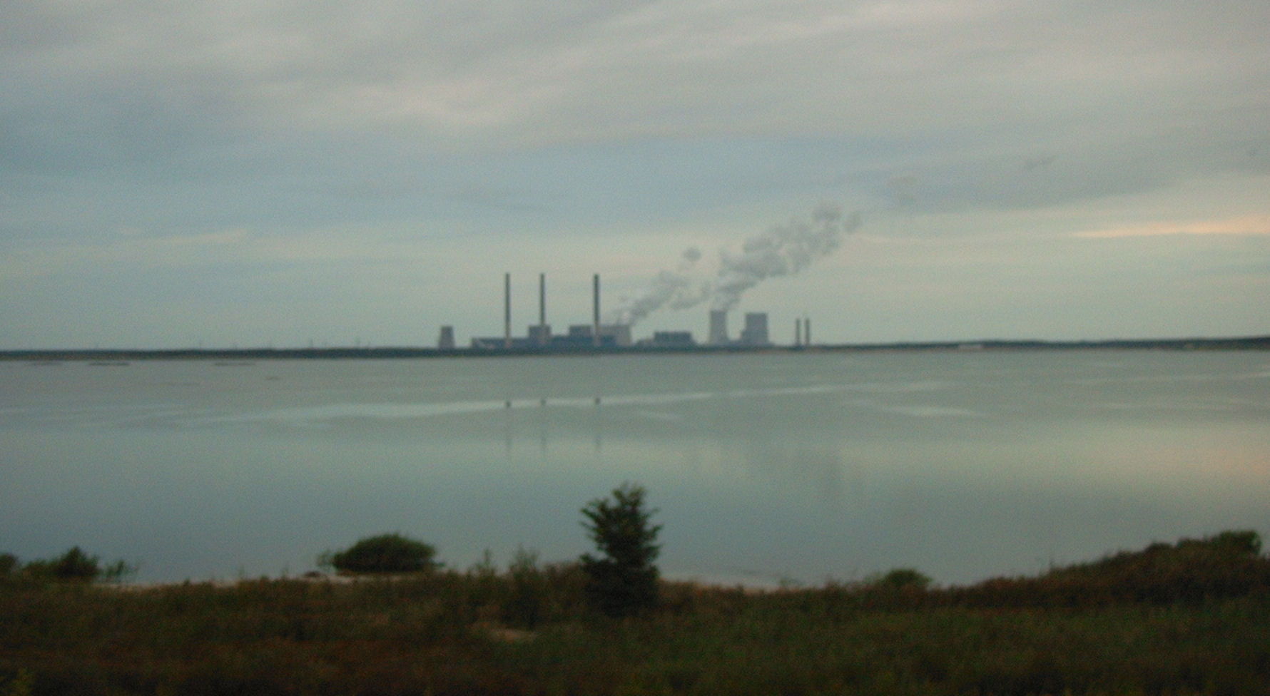 Blick zwischen Uhyst und Klitten über den Bärwalder See auf das Kraftwerk Boxberg